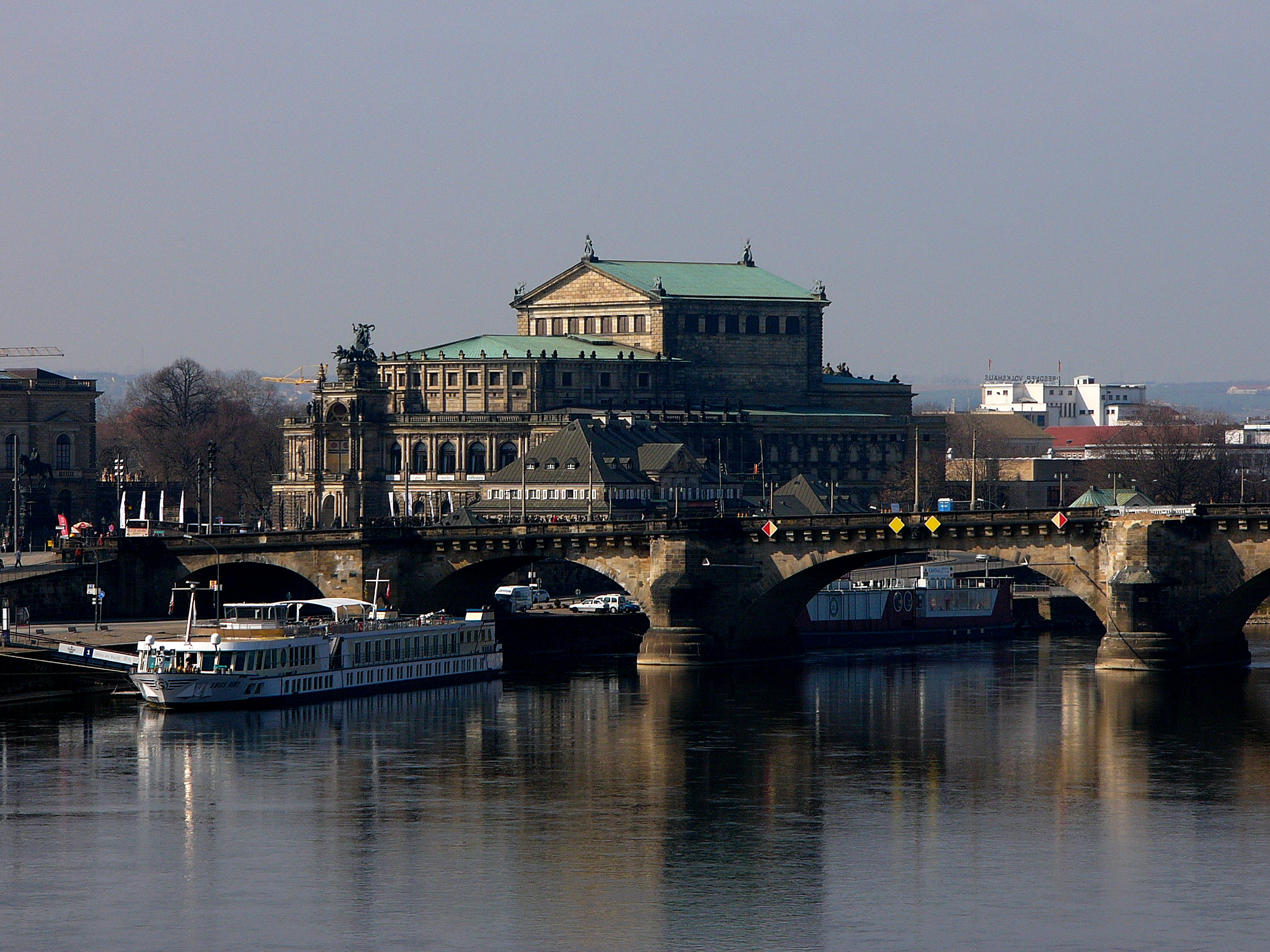 Augustusbrücke und Semperoper